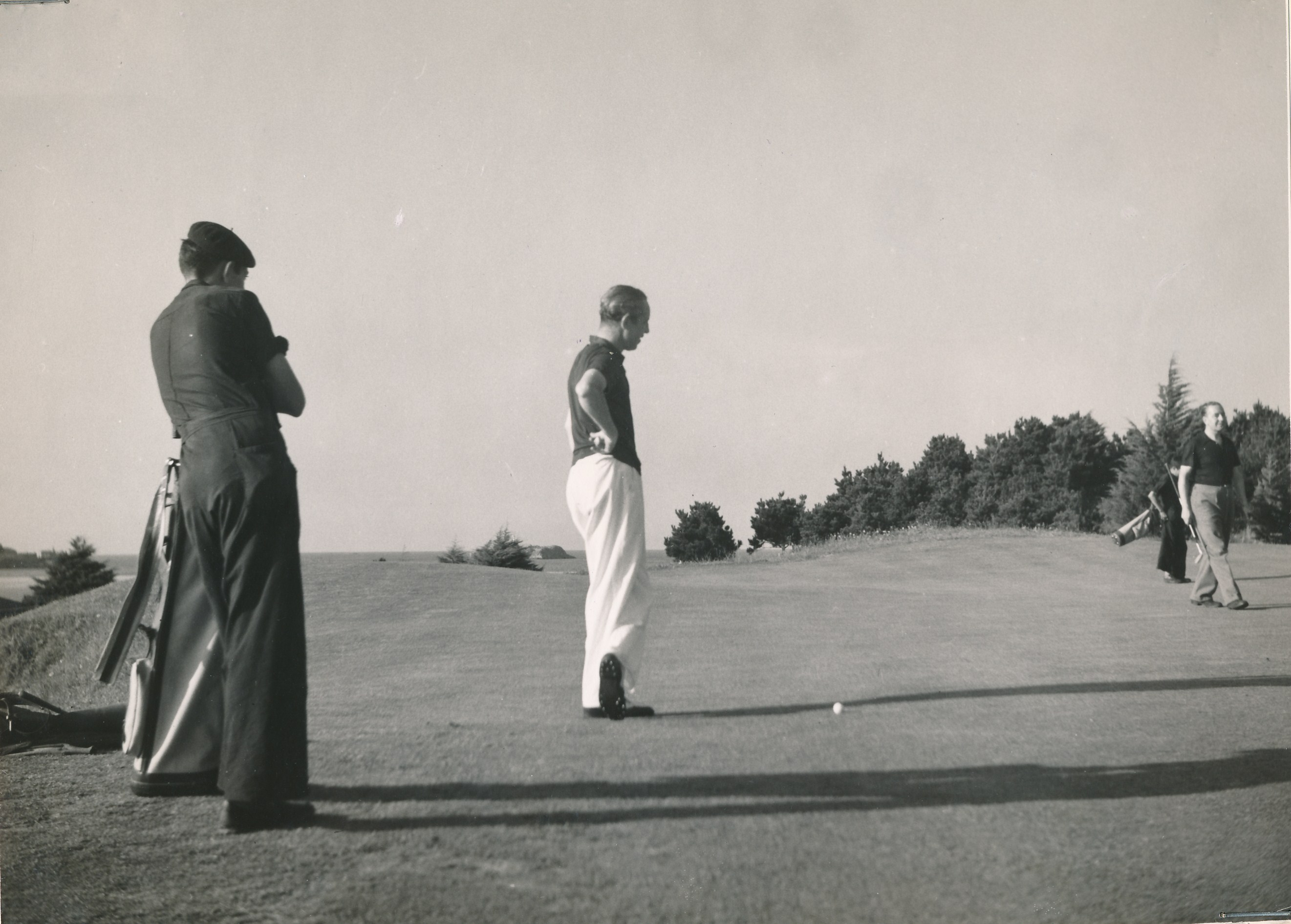 Jugando al golf en el Club de Pedreña. Cantabria (España). Pedreña (Cantabria), septiembre 1942 Procedencia: Archivo Fotográfico de la Dirección General de Turismo (1951-1992) Fotógrafo: Joaquín del Palacio Registro nº: 00042 Signatura: Caja 1 Fondos: Biblioteca de la Facultad de Empresa y Gestión Pública (Universidad de Zaragoza) Legado: Luis Fernández Fuster / E.S. Turismo Huesca